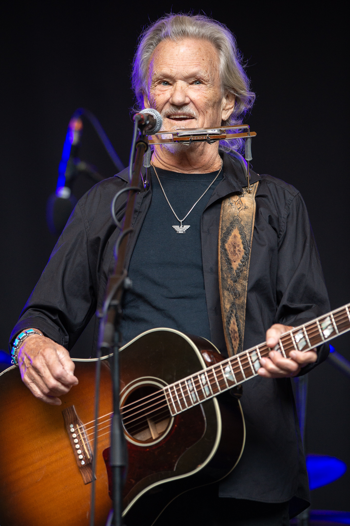 Concertbüro Franken,Konzert,Kris Kristofferson,Livekonzert,Livemusik,Musik,Serenadenhof